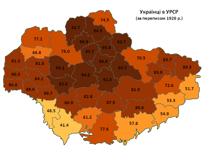 Розселення українців в УРСР за даними перепису 1926 р. / Ukrainians in Ukrainian SSR according to 1926 census